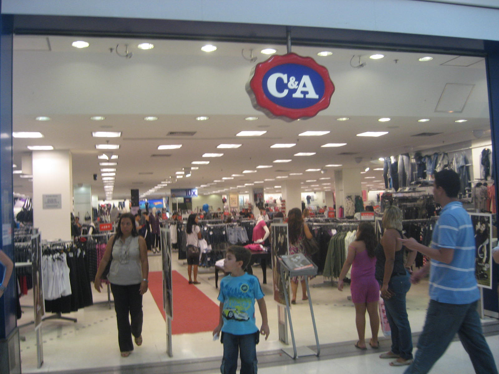 Filial da C&A localizada no Shopping Grande Rio, São João de Meriti, RJ.